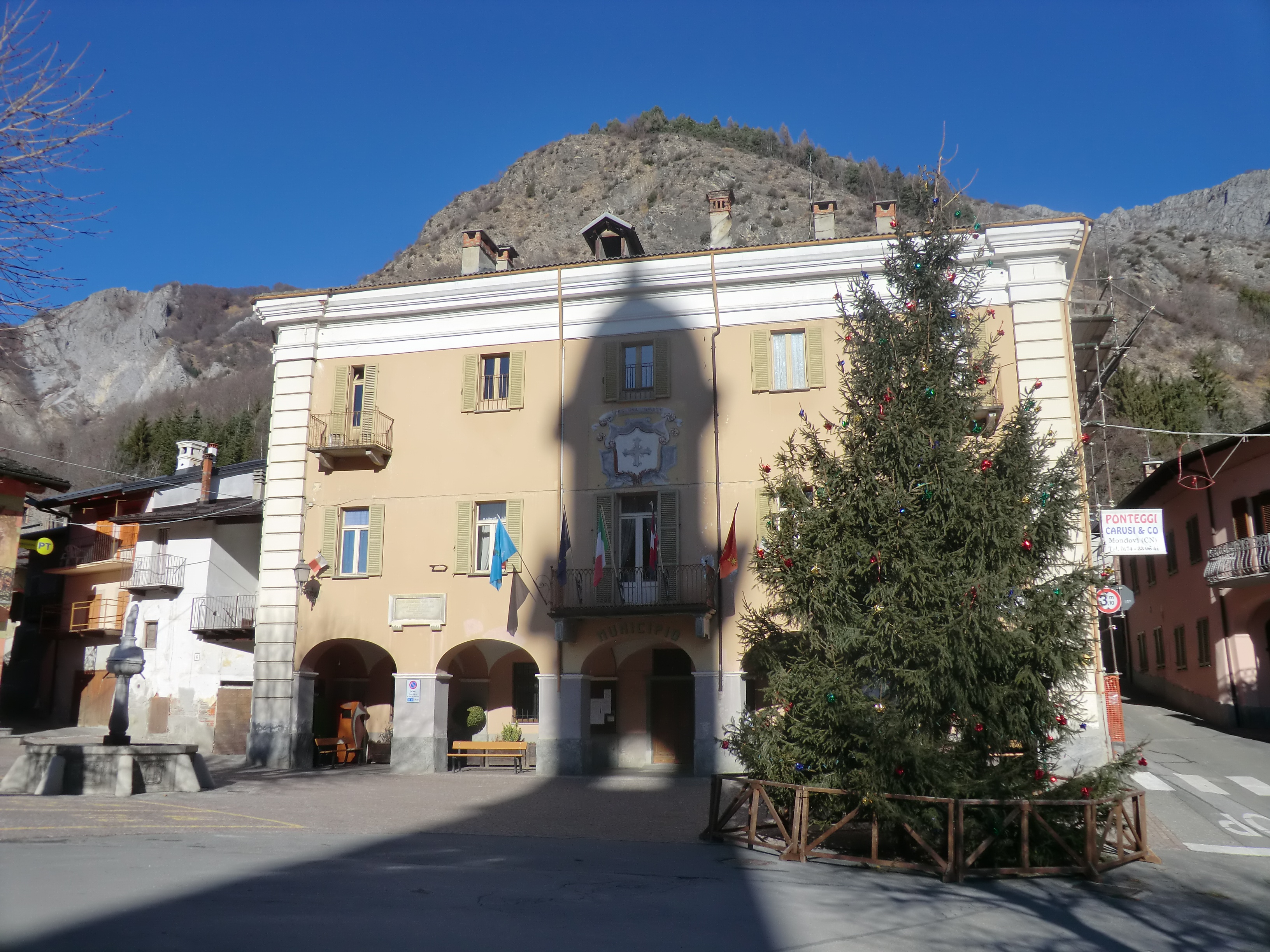 Valdieri (Cuneo): municipio